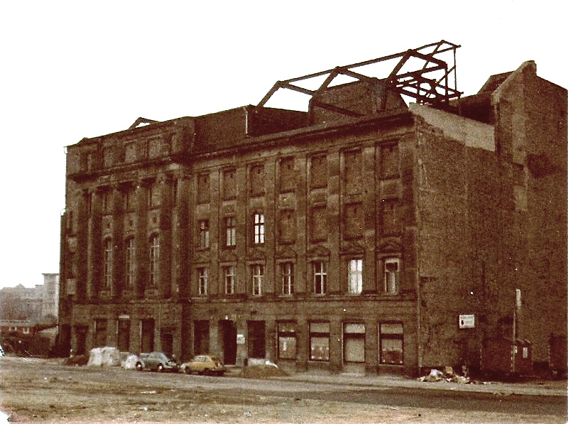 Meistersaal Hansa Tostudio 1975